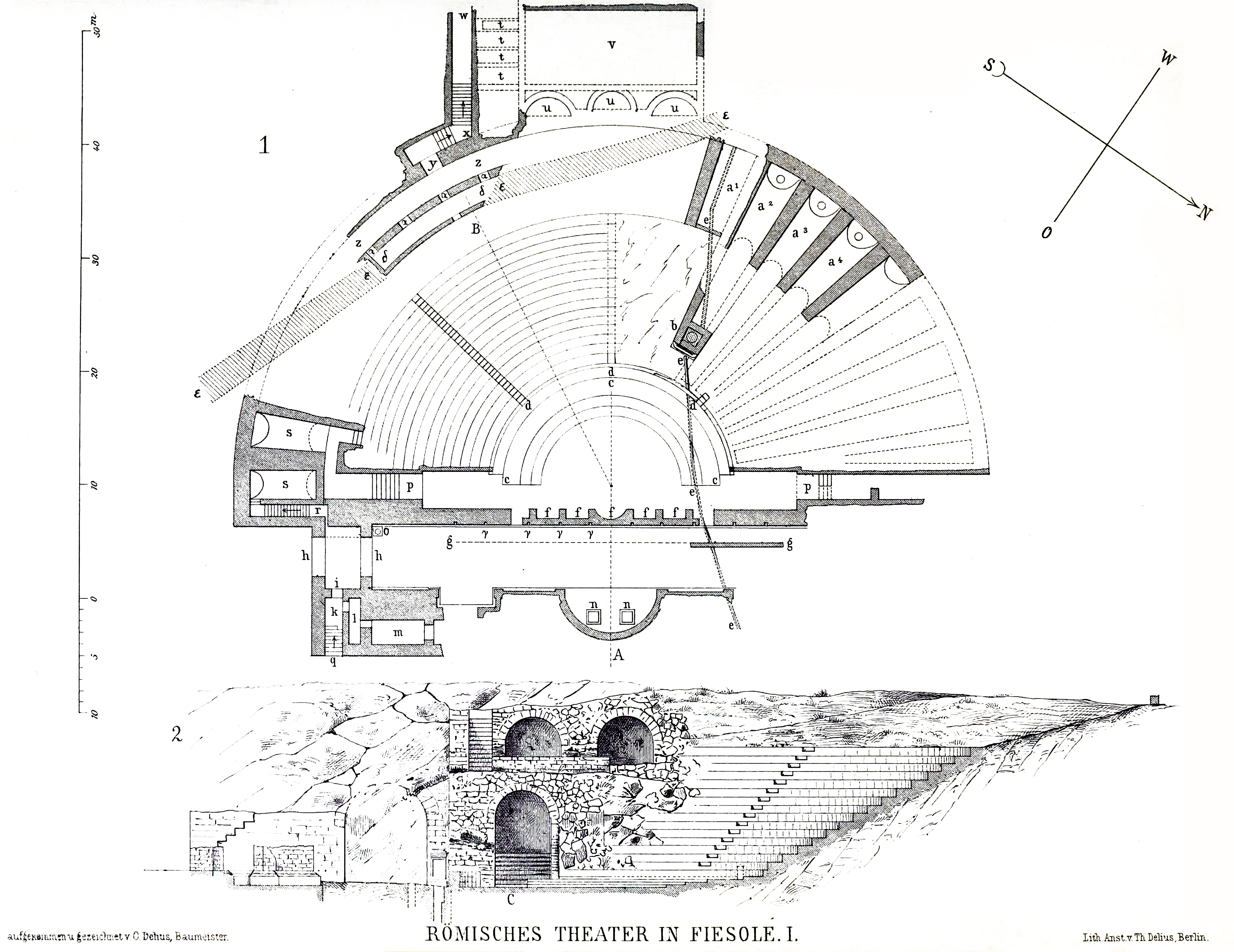 Oskar Delius: Plan des römischen Theaters in Fiesole, um 1875. Delius studierte das Bauwerk während seines Reisestipendiums nach Italien.